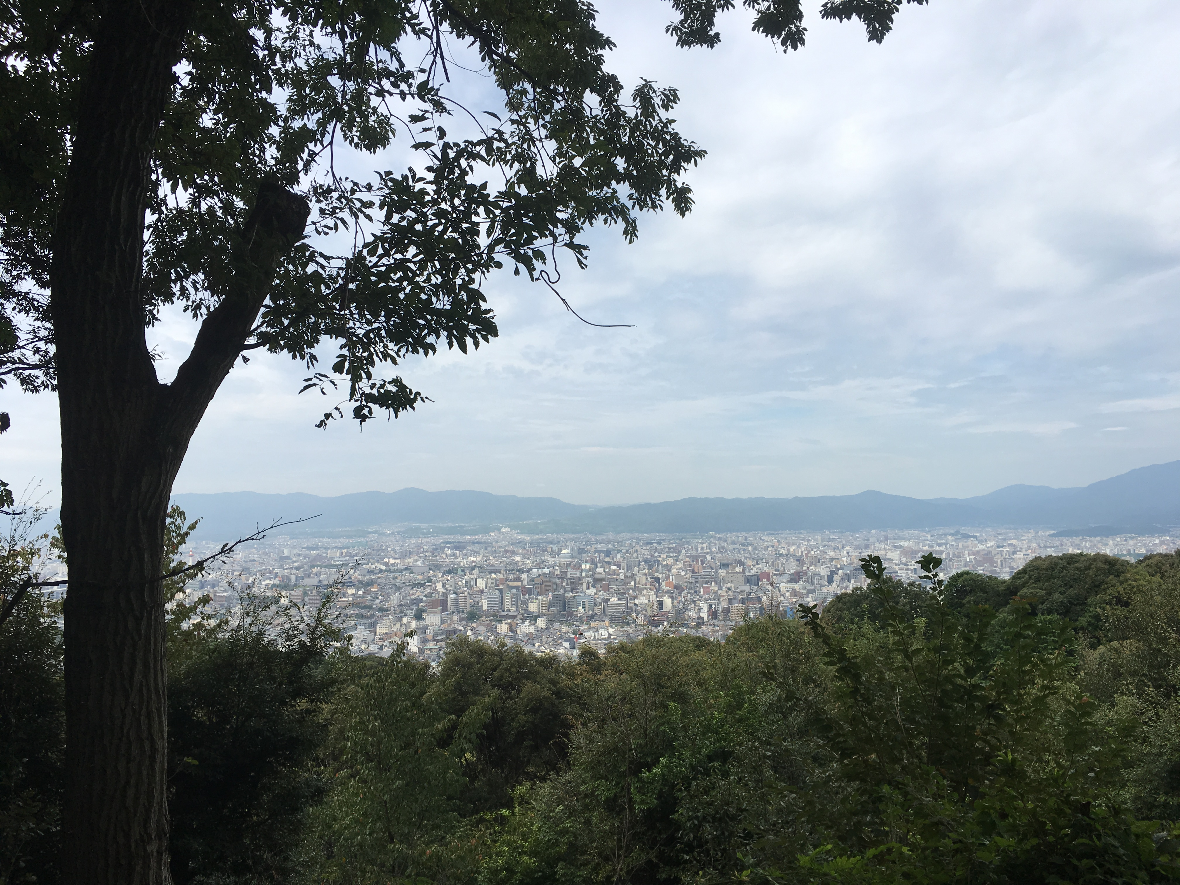 東山山頂公園 展望台から 西向きの眺望 2016年9月16日撮影